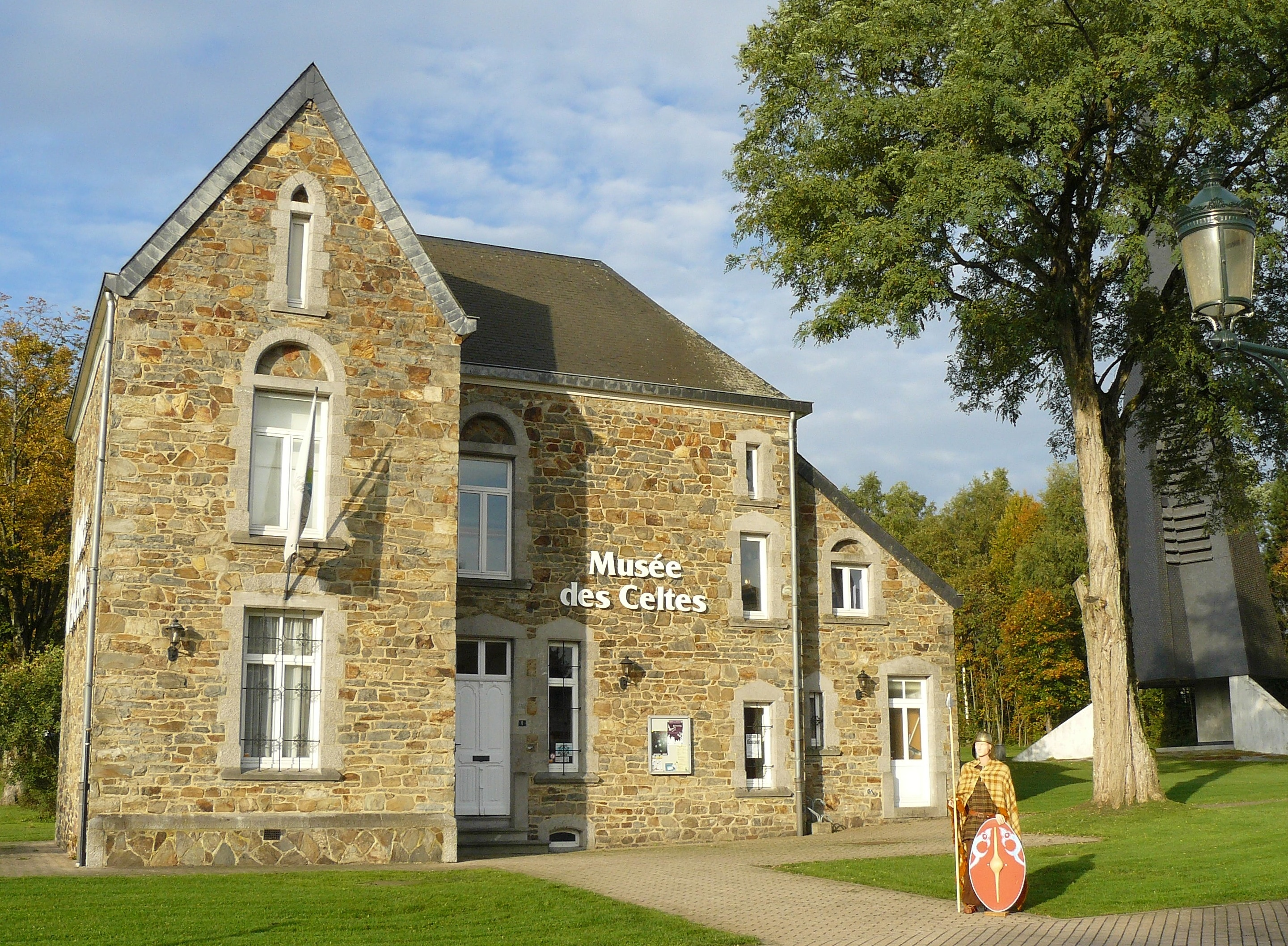 Façade Musée des Celtes de Libramont